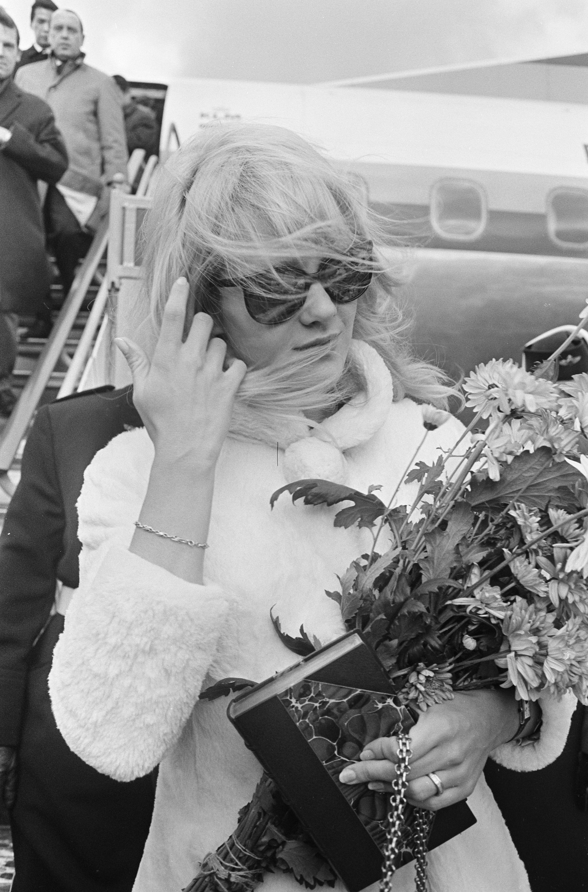 Collectie / Archief : Fotocollectie Anefo Reportage / Serie : [ onbekend ] Beschrijving : Aankomst Sylvie Vartan op Schiphol Datum : 9 december 1966 Locatie : Noord-Holland, Schiphol Trefwoorden : aankomsten Persoonsnaam : Vartan, Sylvie Fotograaf : Koch, Eric / Anefo Auteursrechthebbende : Nationaal Archief Materiaalsoort : Negatief (zwart/wit) Nummer archiefinventaris : bekijk toegang 2.24.01.05 Bestanddeelnummer : 919-8628 Reacties Geplaatst door Geschiedenismens - zangeressen op 06 december 2017 - 17:27. NB. Zij was in Nederland voor de opnamen van het VARA televisieprogramma 'Fanclub', uitgezonden op 16-12-1966